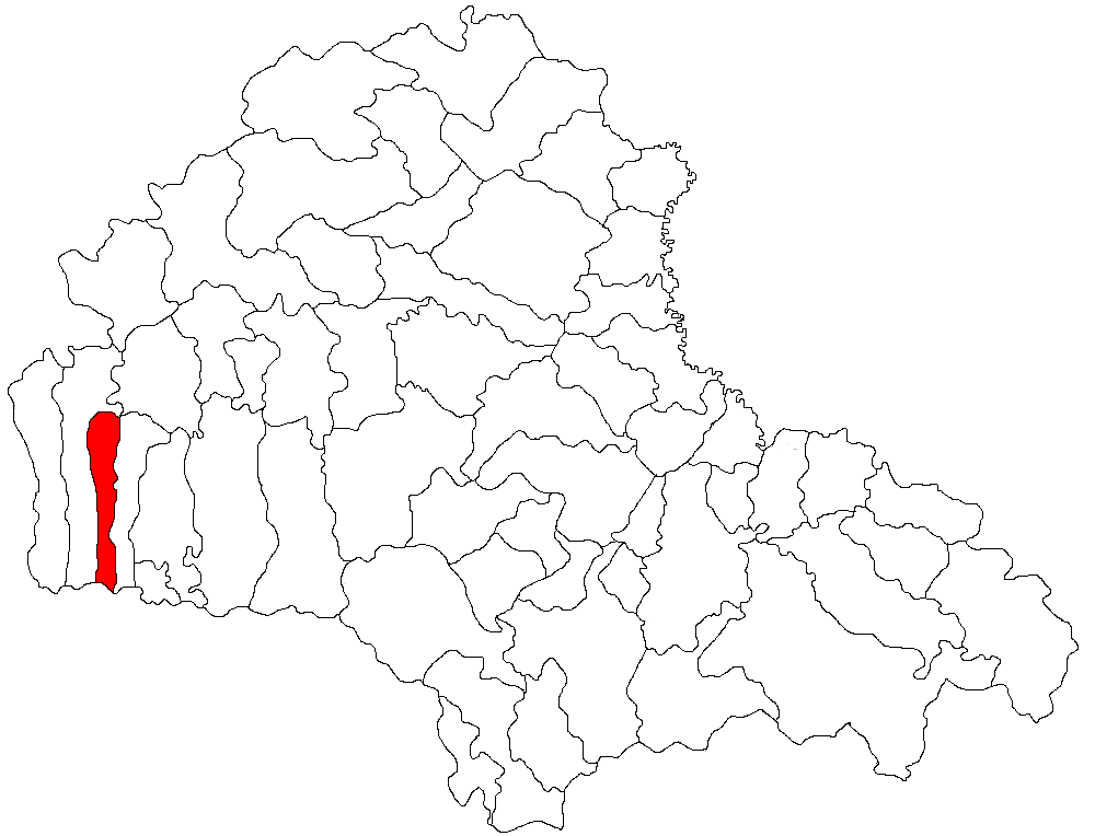 Categorie:Hărţi ale judeţului Braşov